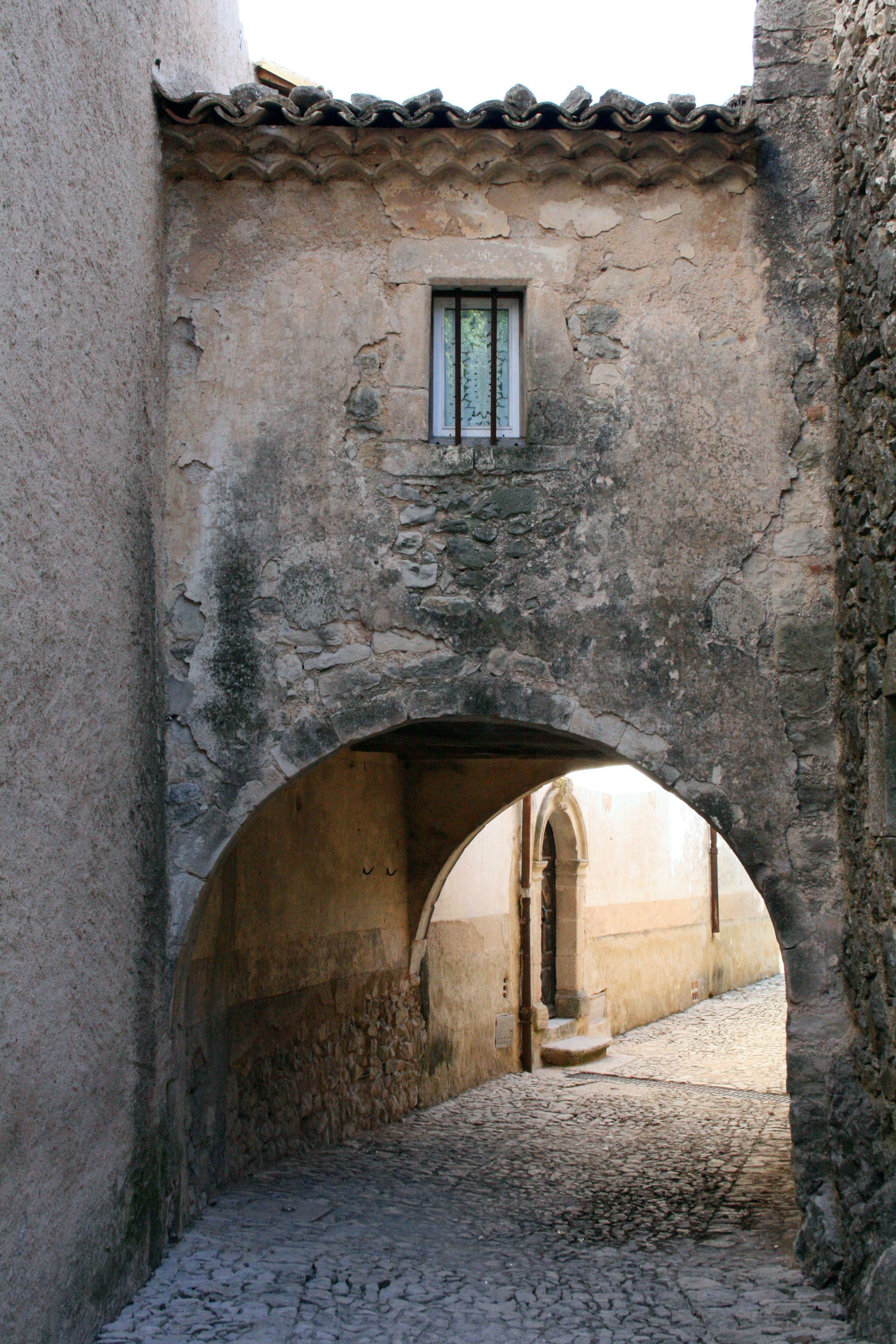 Banon, département des Alpes-de-Haute-Provence (France). Vieux village: rue des Arcades